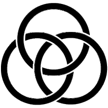 宮川町 紋章